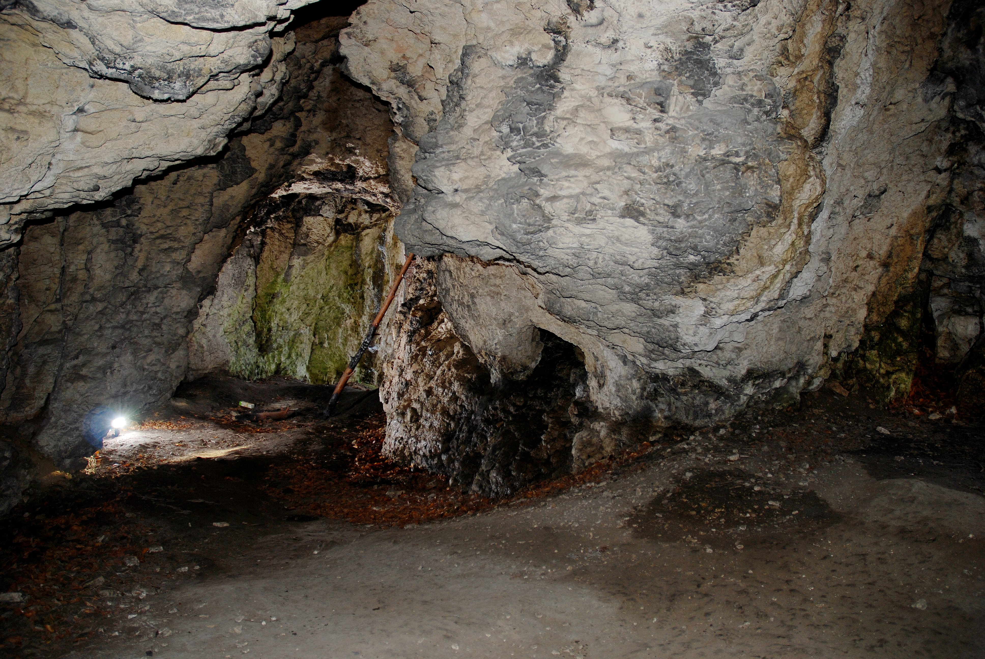 Jaskinia w Straszykowej Górze